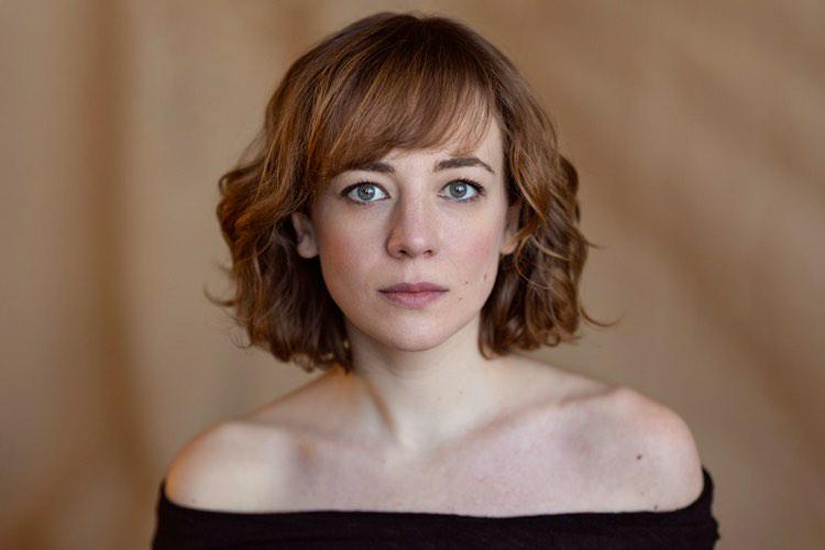 Sara Lazzaro - Attrice Italiana/Statunitense